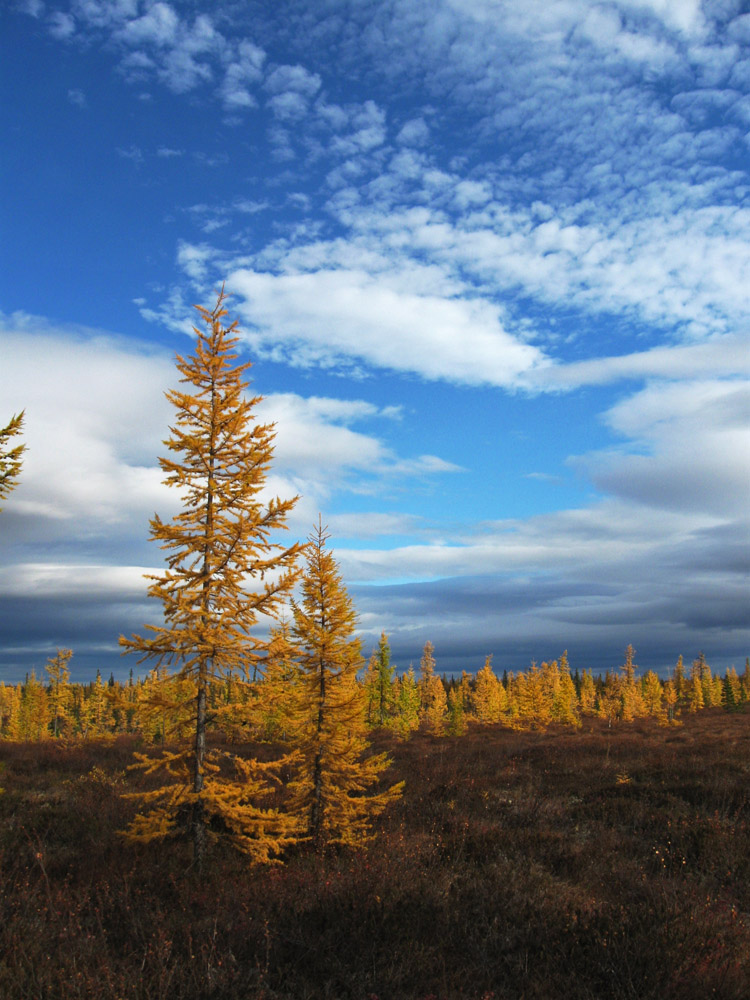 Лесотундра возле реки Полуй в 60 км по железной дороге от Салехарда